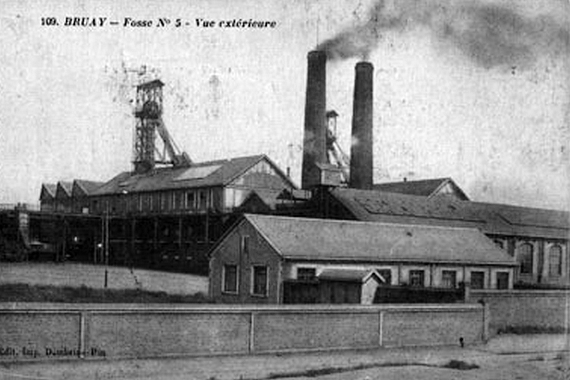 Puits n° 5 , 5Bis et 5Ter de la Compagnie des mines de Bruay, site situé à Divion. En 1891, la fosse est reliée au réseau ferré de la Compagnie, toutefois , l' exploitation commence en 1898. Le 5Bis commence à être foncé en 1892 et ouvre en 1902 , cette année là , le 5Ter est en cours de creusement , il a toujours servi comme retour d' air. Il était équipé d' un ventilateur. Le site possédait un lavoir à grains pour charbons dont le calibre est compris entre 2 et 15cm. Sa production journalière était d' environ 1300 à 1600 Tonnes nettes vers 1964.